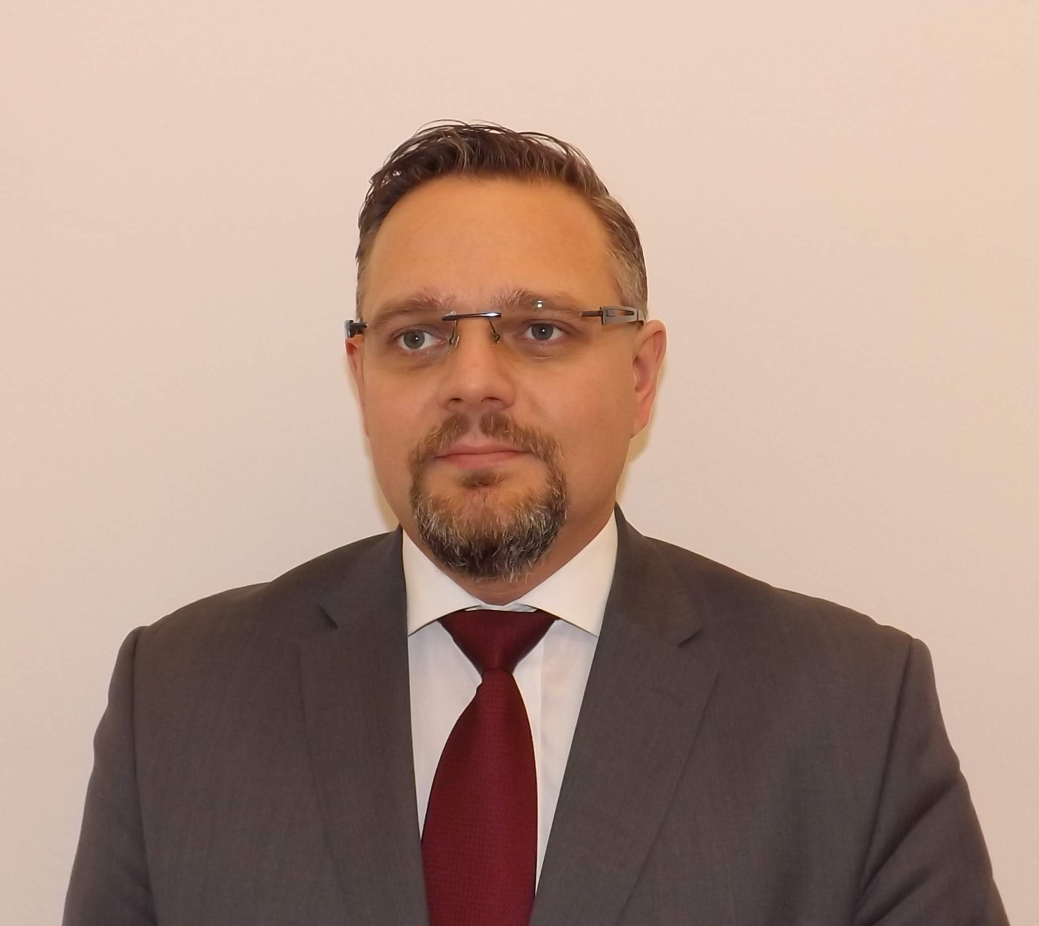 Jacek Najder, poseł Twojego Ruchu.